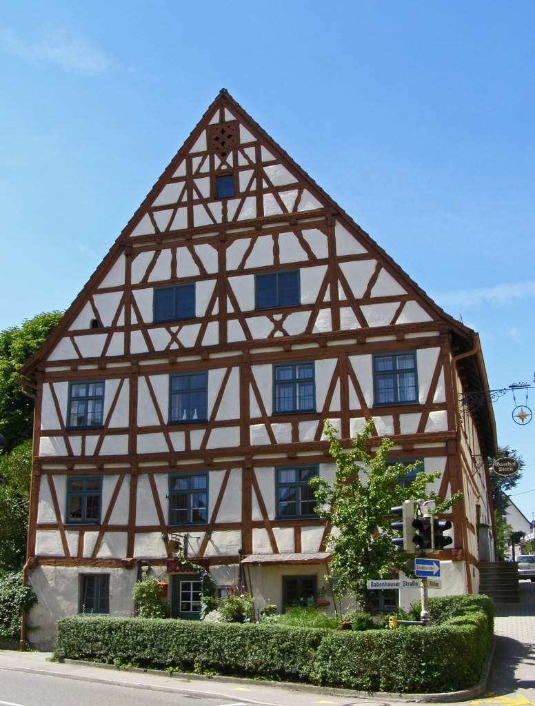 Krumbach (Schwaben) - Fachwerkhaus "zum Stern"